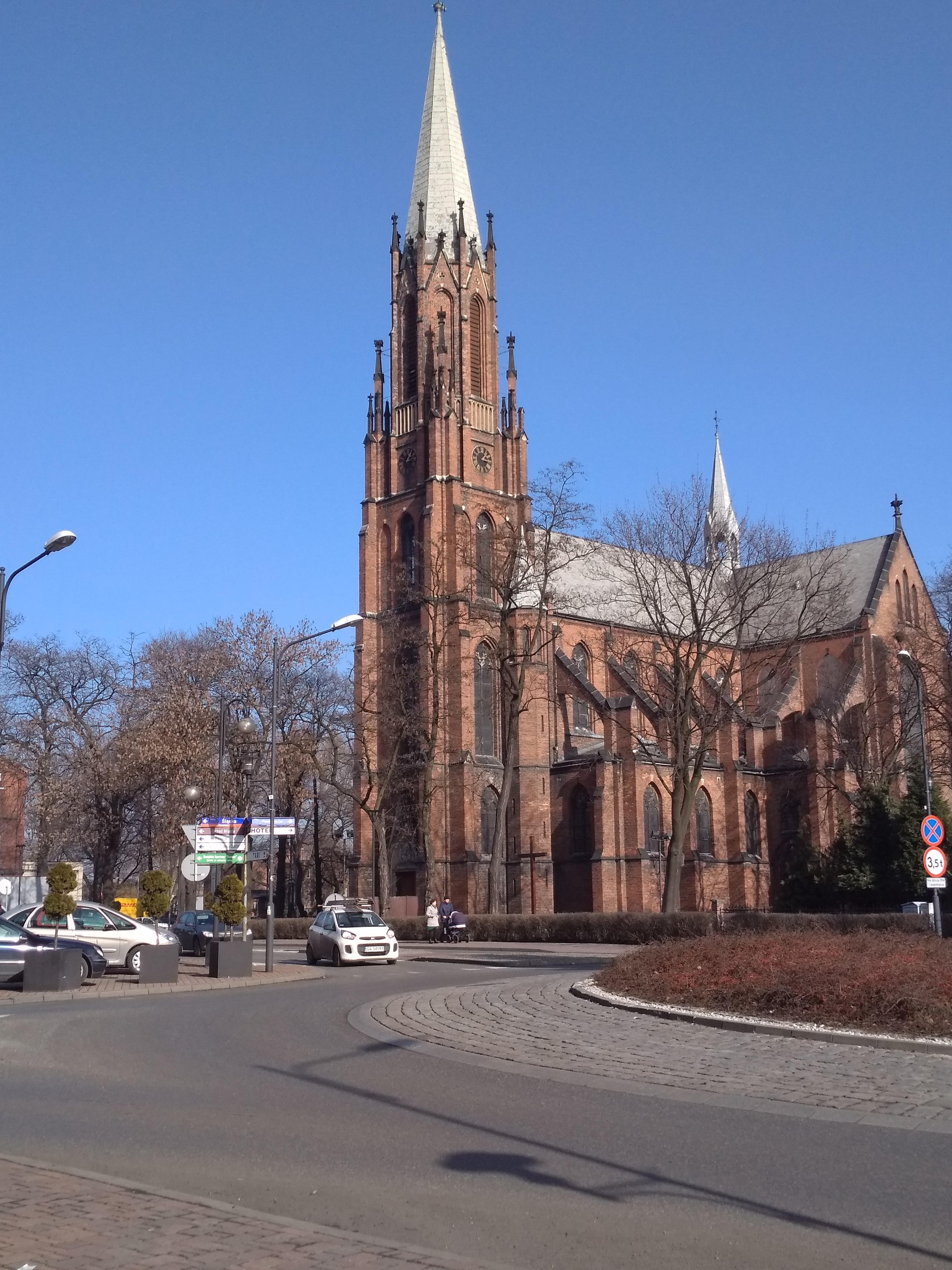 Kościół pw. Świętego Krzyża w Siemianowicach Ślaskich